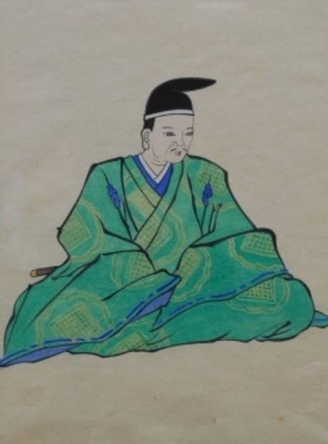 大浦光信の肖像。